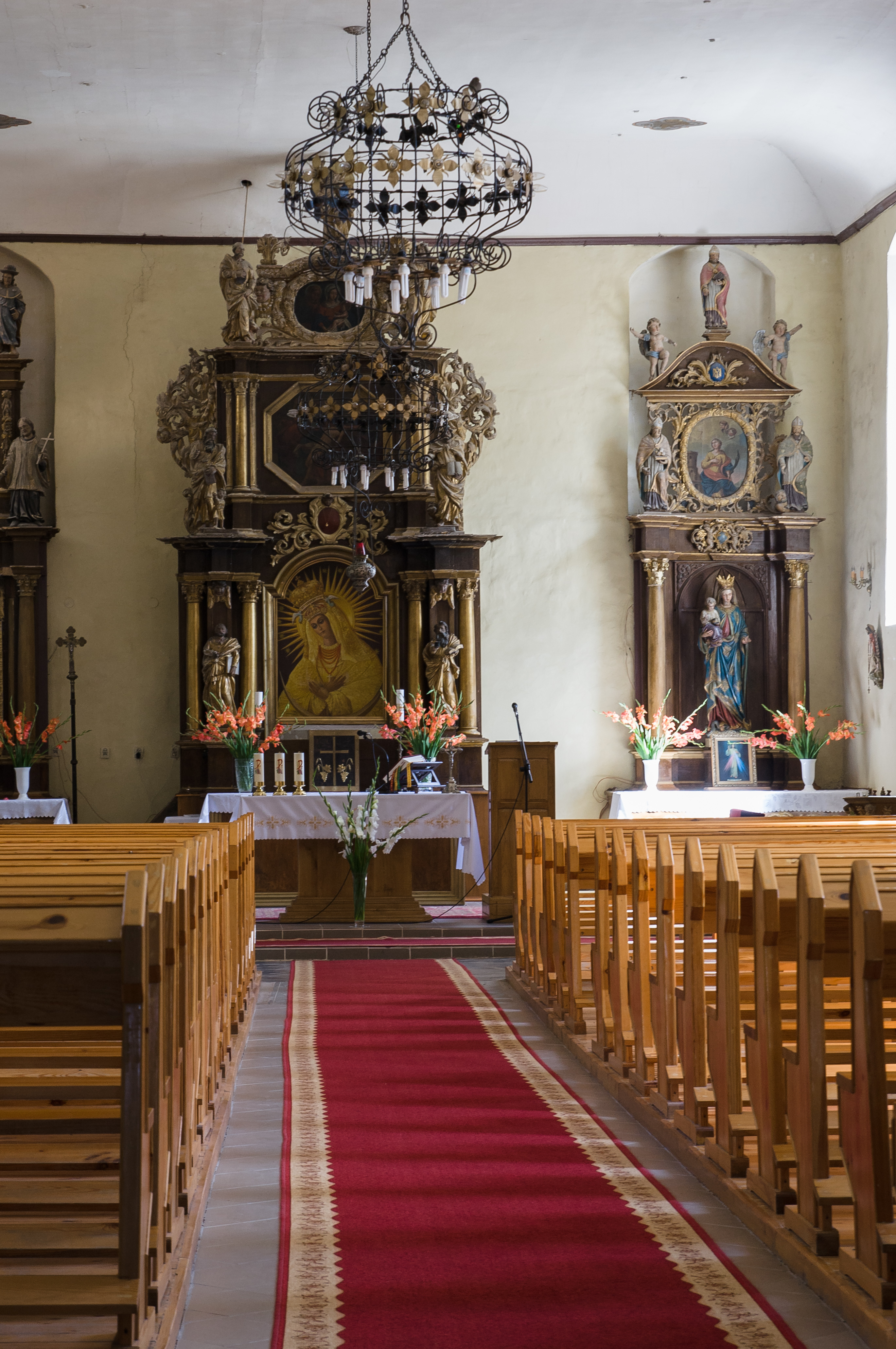 Pluty, kościół św. Wojciecha.